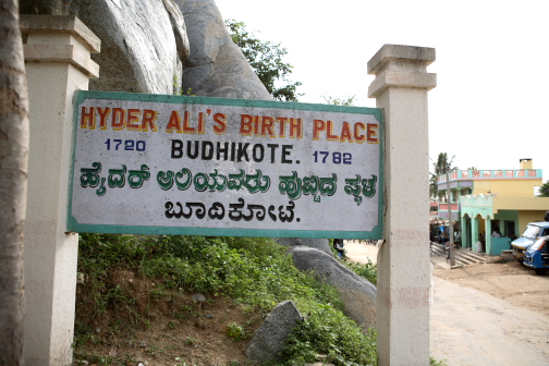 Budikote